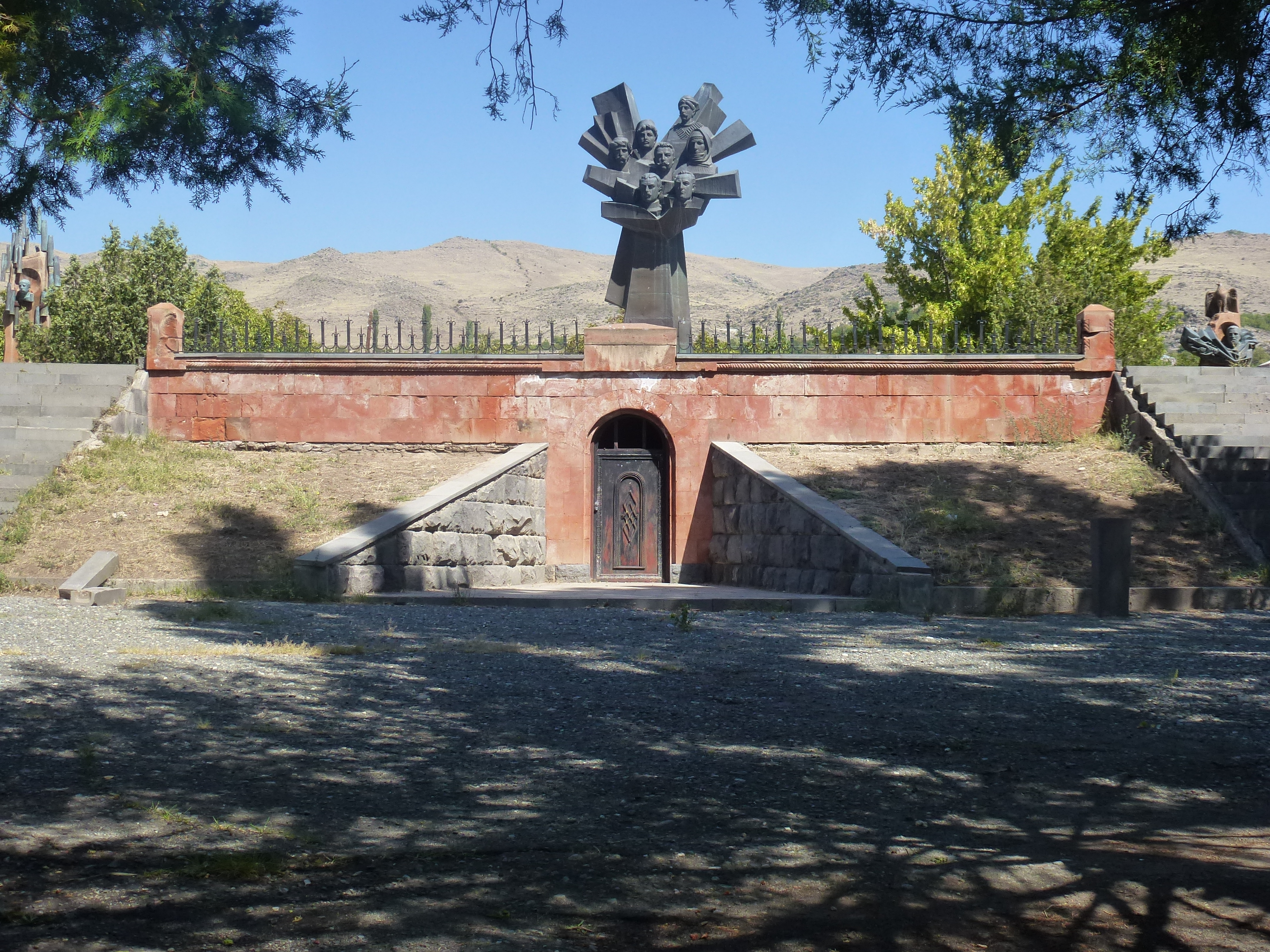 Ուջան, Արագածոտնի մարզ, ՀՈՒՇԱՐՁԱՆՆԵՐ, գ.մ. 109/10